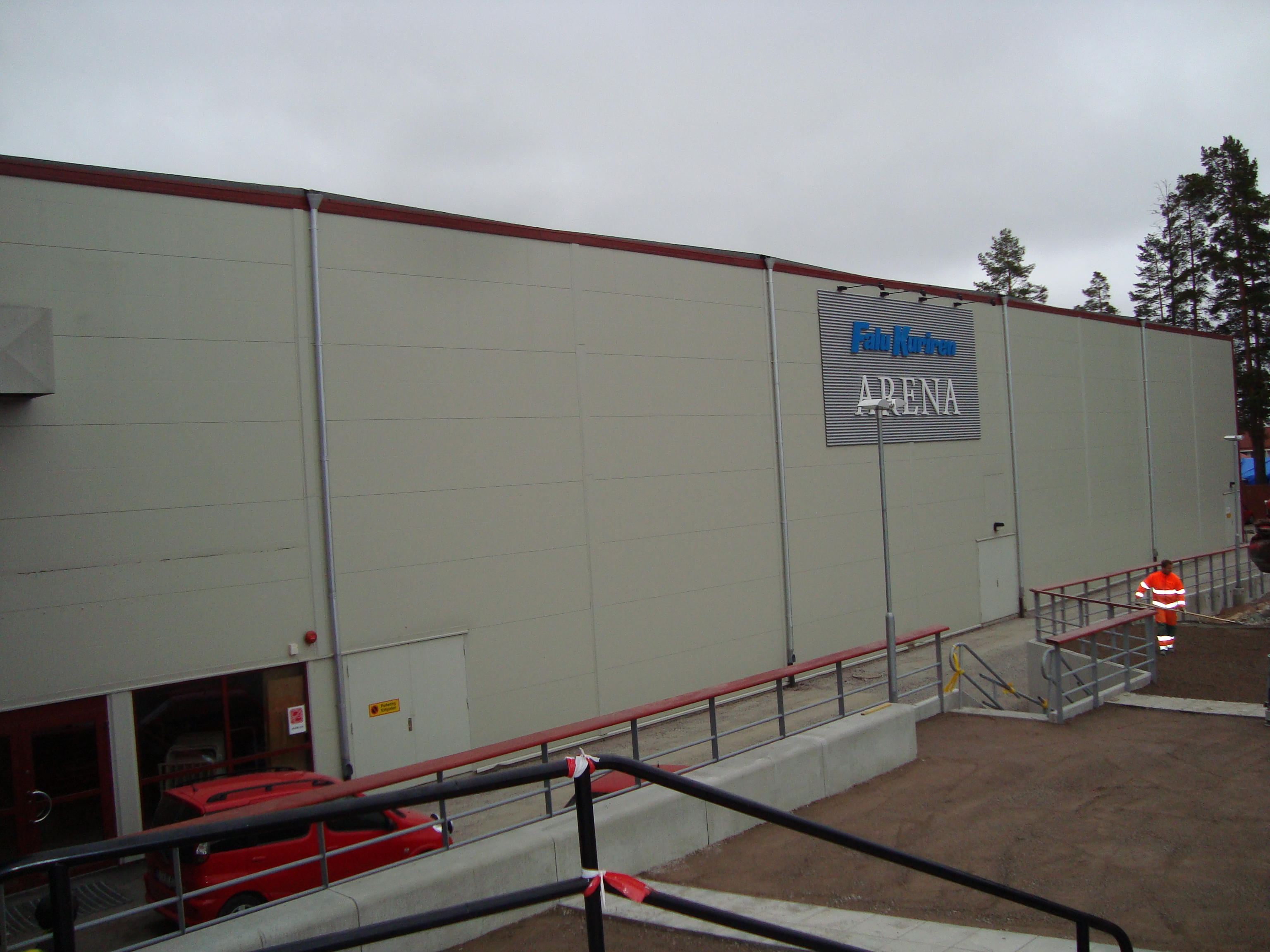 Falu Kuriren Arena, floorball arena at Lugnet, Falun, Sweden